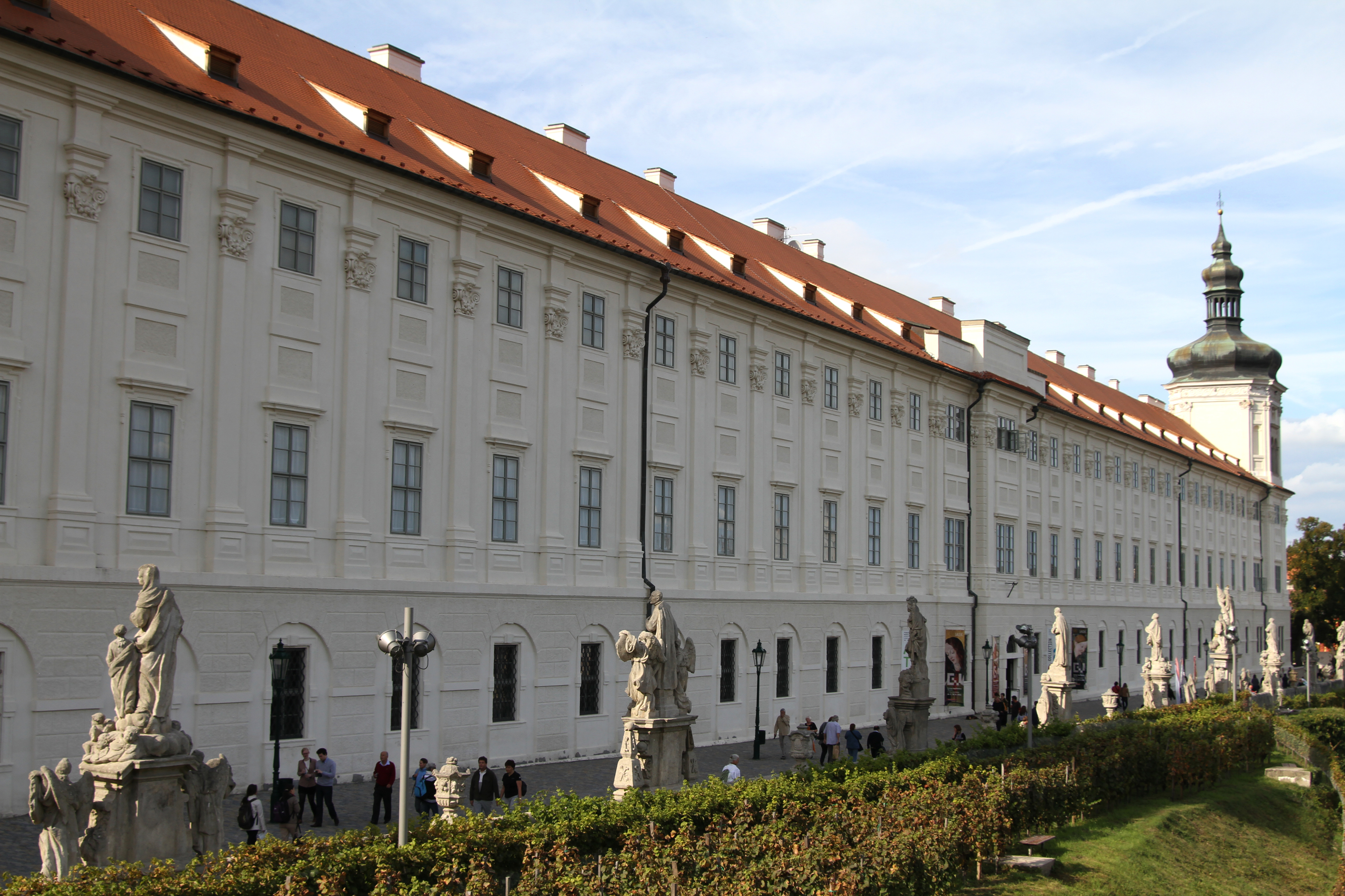 Kolej jezuitská (Kutná Hora), Barborská, čp. 51, 52, 53 a 54 51/24, Kutná Hora